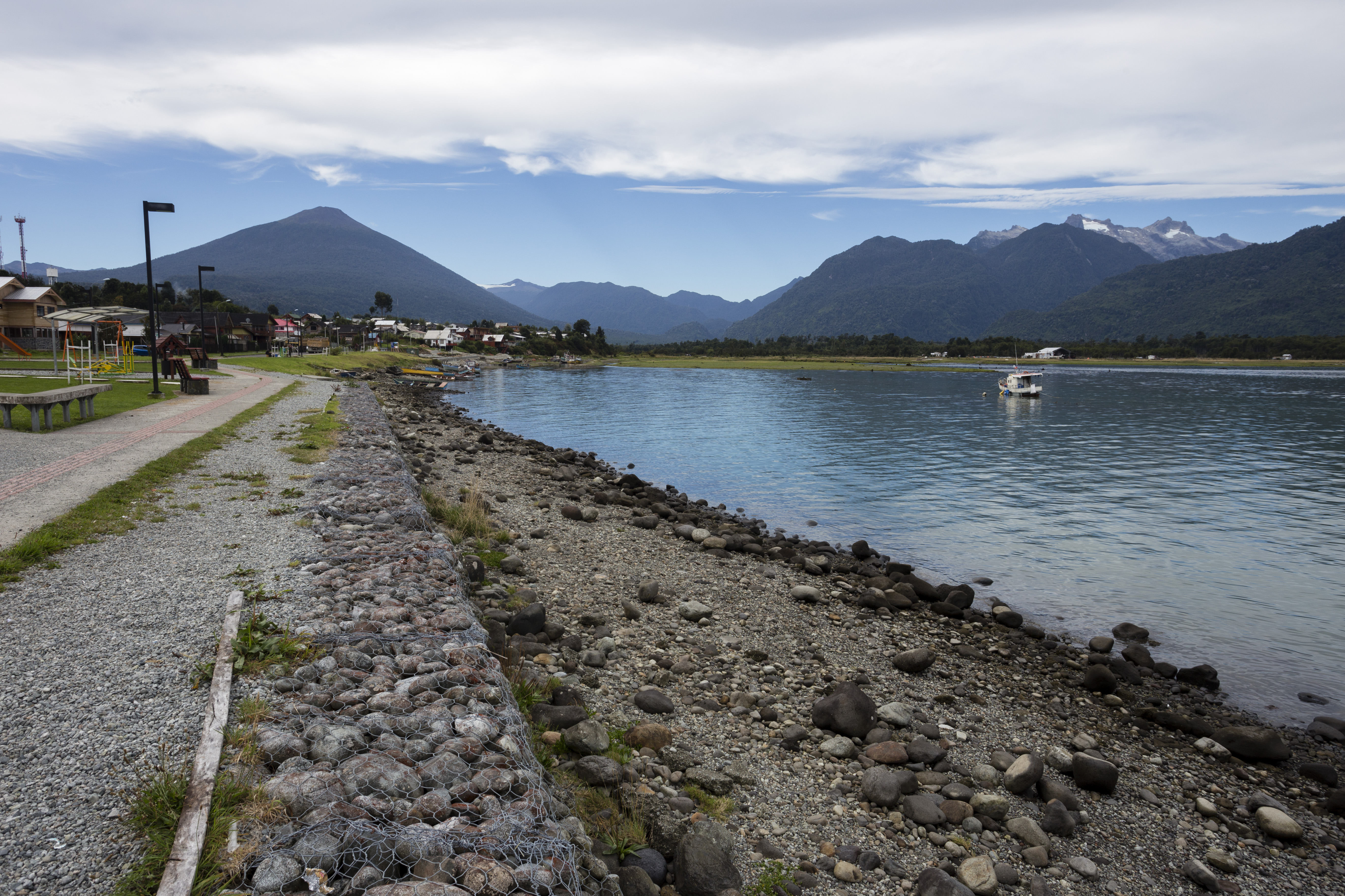 Costanera de Hornopirén, comuna de Hualaihué, Chile.